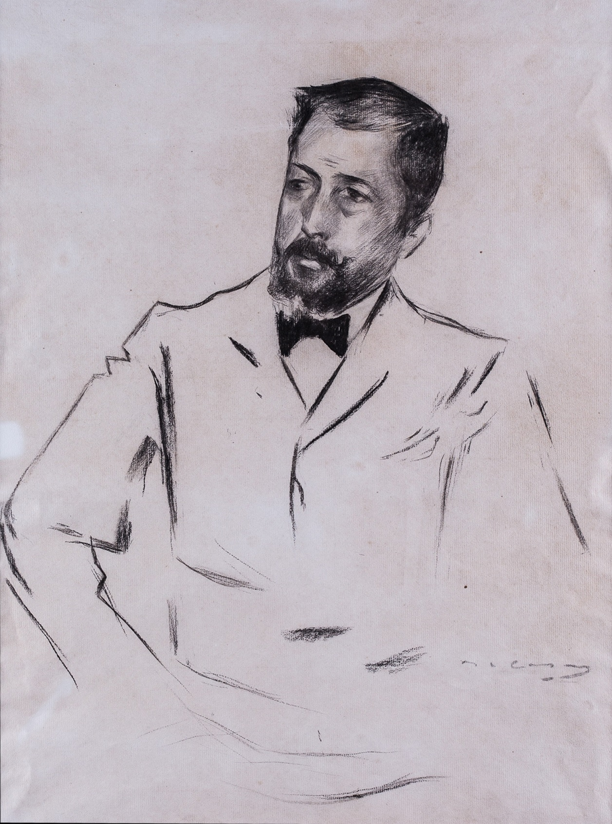 Retrat del pintor Marià Vayreda fet per Ramon Casas i Carbó (Barcelona, 4 de gener de 1866 - Barcelona, 29 de febrer de 1932)